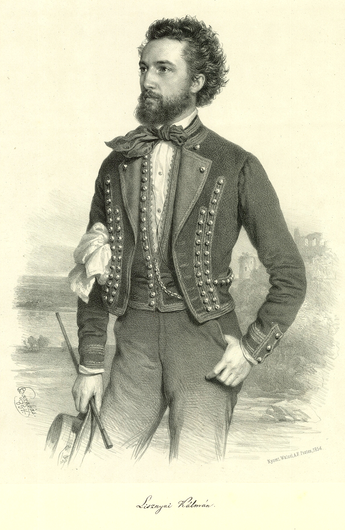 Lisznyai Kálmán (1823–1863) költő, honvéd őrnagy